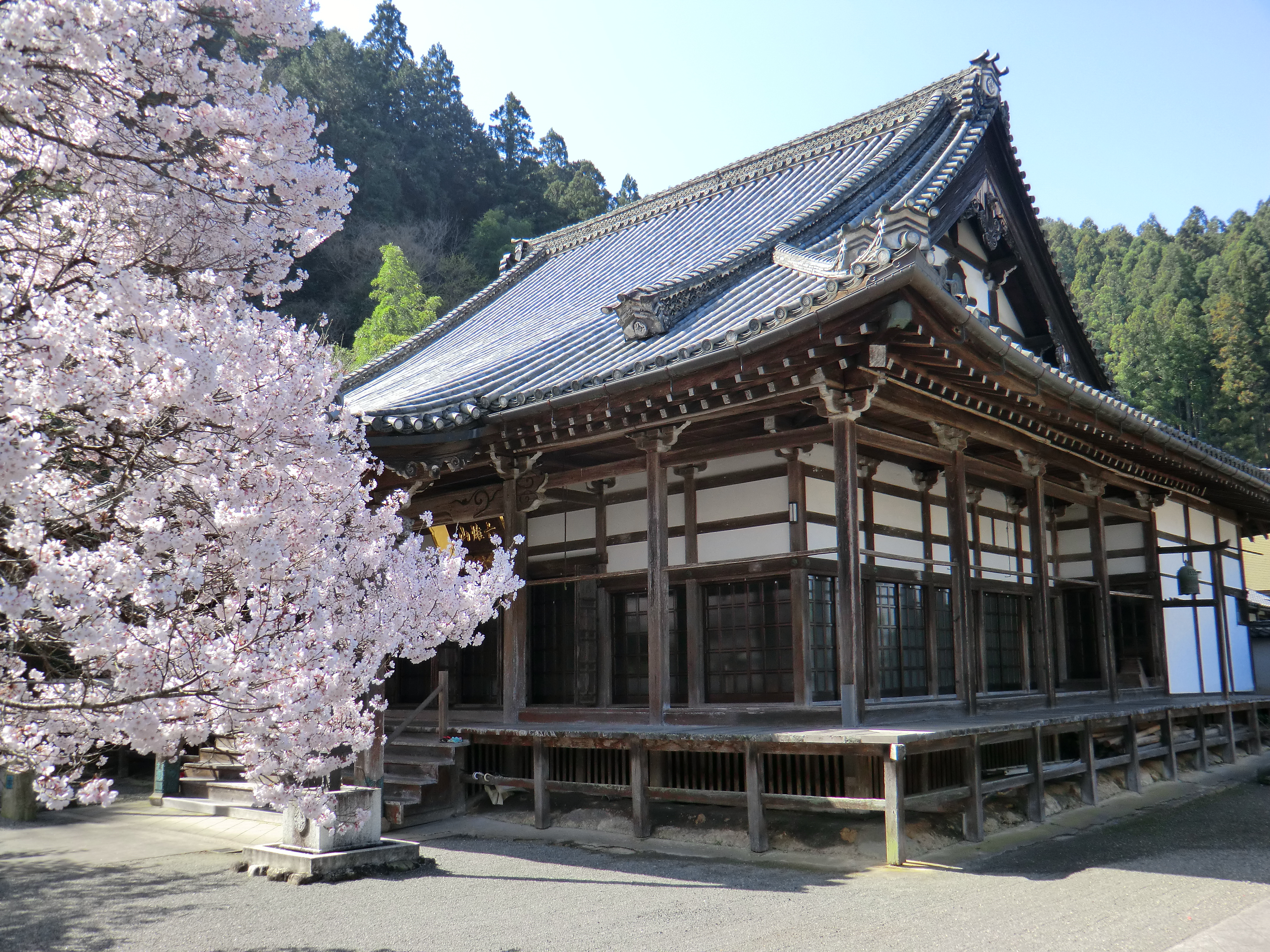 本善寺本堂 (登録有形文化財)